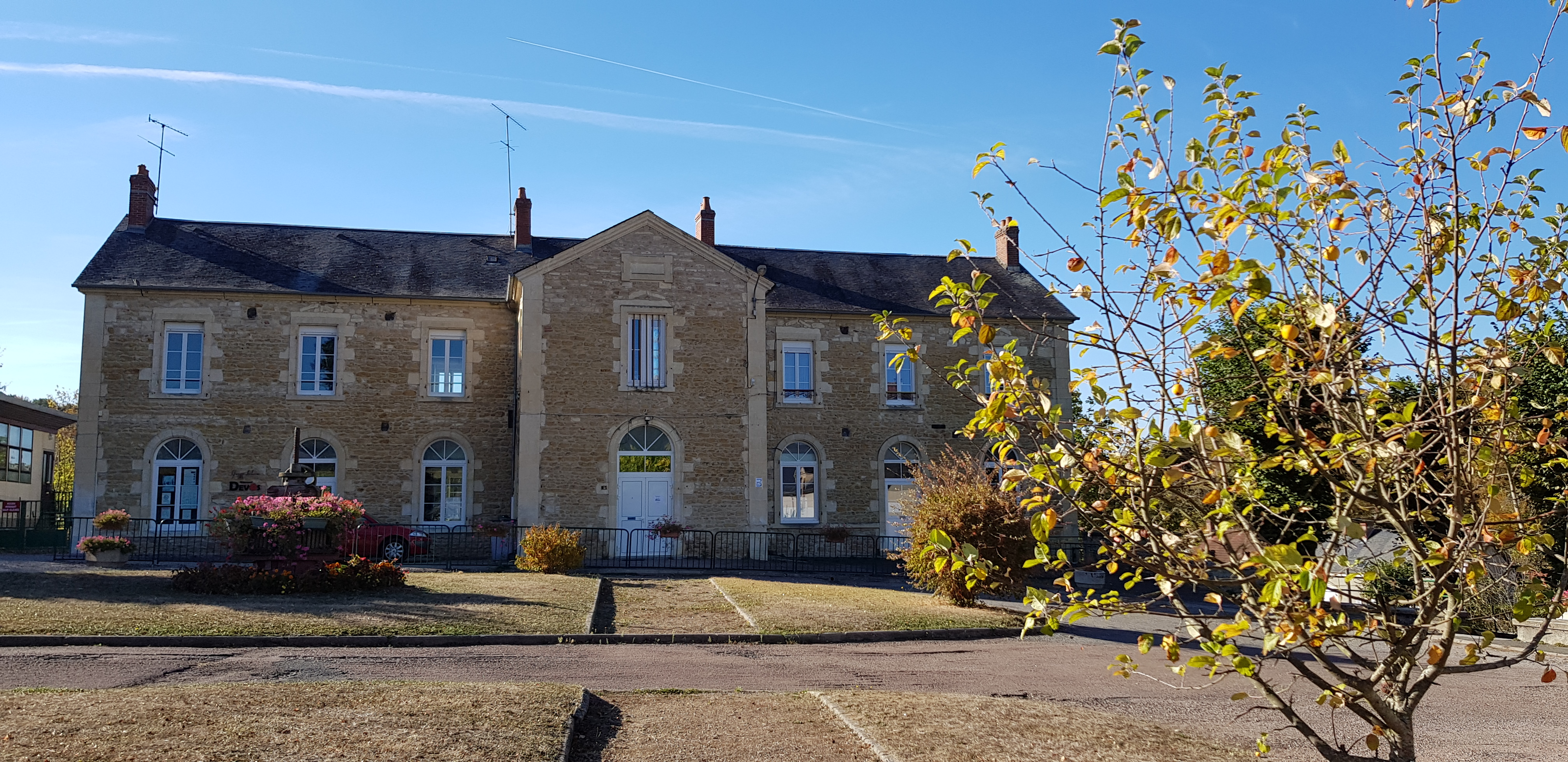 Ecole "Raymond-Devos", Chaulgnes, Nièvre.